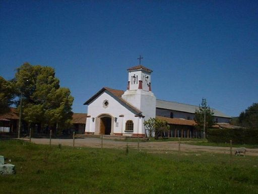 viceparroquia de Alcones